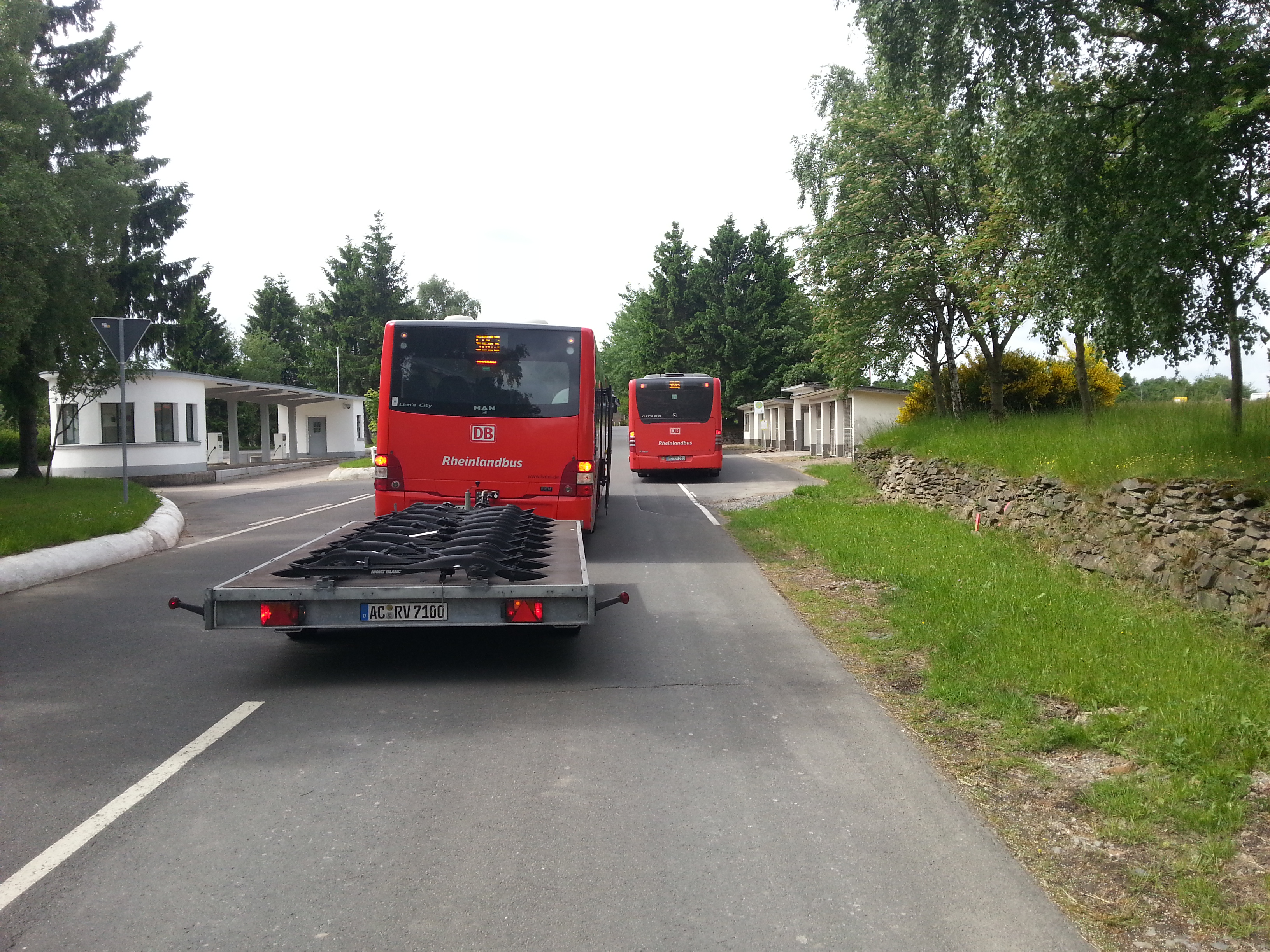 Busse der RVE als Schnellbuslinie SB63 an der Haltestelle Vogelsang Parkplatz. Zur sonntäglichen "Rush Hour" treffen sich ein Gelenkbus und der Fahrradbus aus Aachen in Vogelsang. Nicht im Bild steht vor dem Gelenkbus auch noch ein Bus der RVK als Schnellbusline SB82 vom Bahnhof Kall.